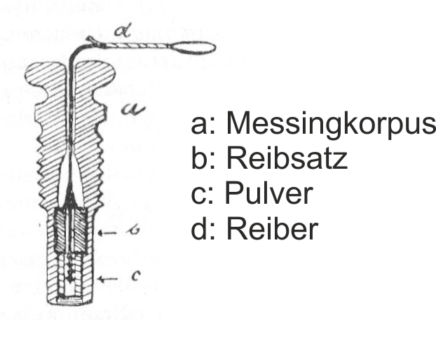 Beschreibung der Reibzündschraube und ihrer Einzelteile